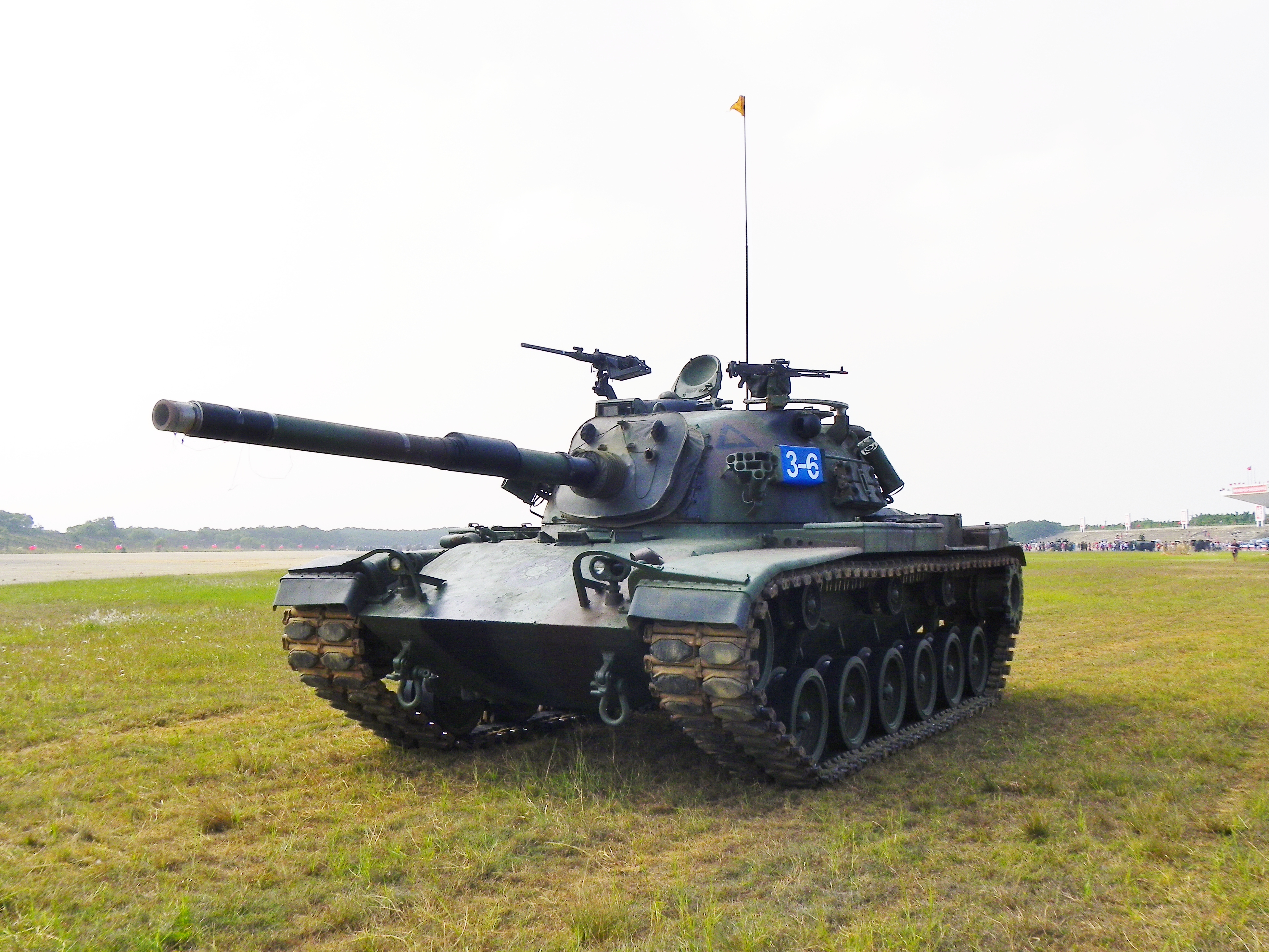 2011年陸軍湖口營區開放活動，上午地空整體作戰攻擊演練後，停留現場待命的CM-11戰車正面。